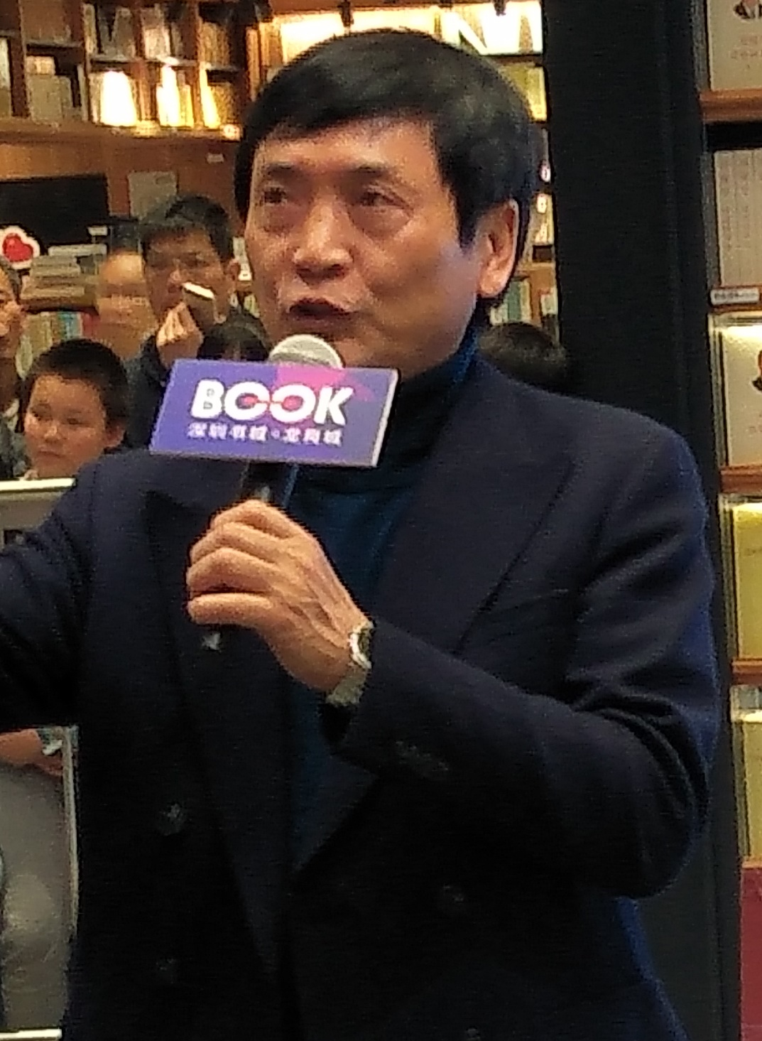 曹文轩，2020年1月18日于深圳